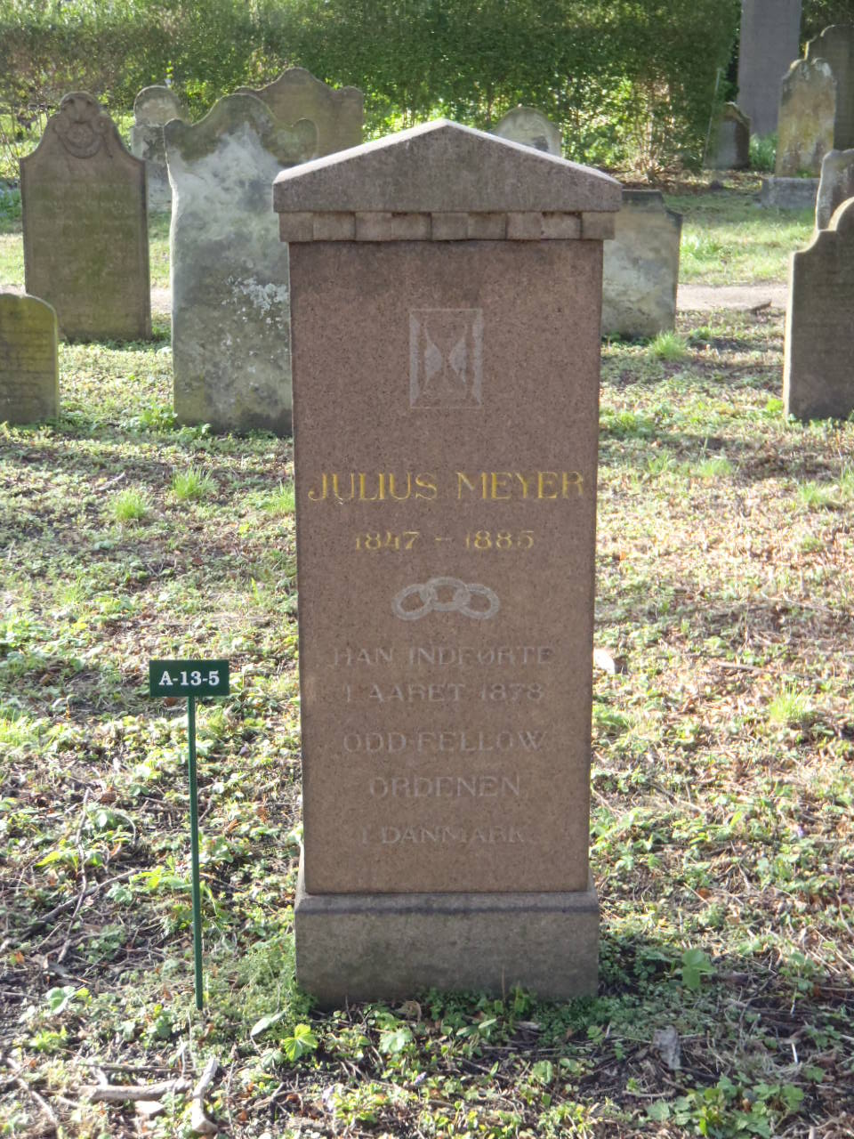 Julius Meyer. Gravsten på den jødiske kirkegård i København. Indskriften er "JULIUS MEYER. 1847-1885. HAN INDFØRTE I AARET 1878 ODD FELLOW ORDENEN I DANMARK".